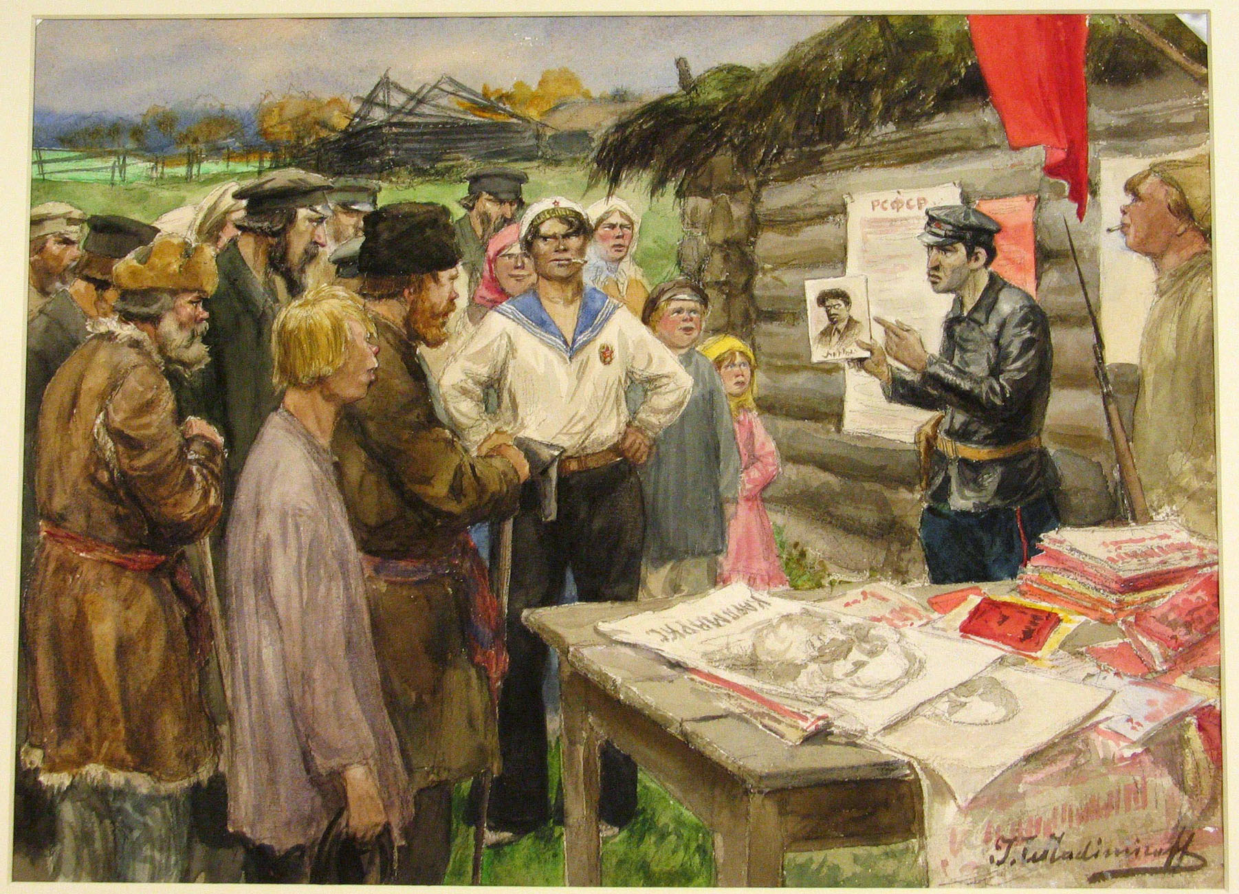 картина Ивана Владимирова "Агитатор"